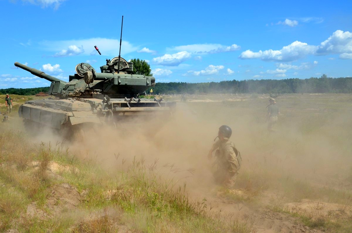 Т-64Б. На базі 169-го Навчального центру Сухопутних військ Збройних Сил України «Десна» проведено практичні заняття із майбутніми командирами механізованих взводів – випускниками факультету підготовки офіцерів запасу Національного університету оборони України імені Івана Черняховського. Протягом кількох днів студенти ознайомлювалися з навчально-матеріальною базою «Десни» − одного з найбільших навчальних центрів, який готує фахівців практично всіх спеціальностей для Сухопутних військ. Тут заняття проходять не лише в навчальних корпусах, але й на тактичних полях, полігонах та танкодромах.